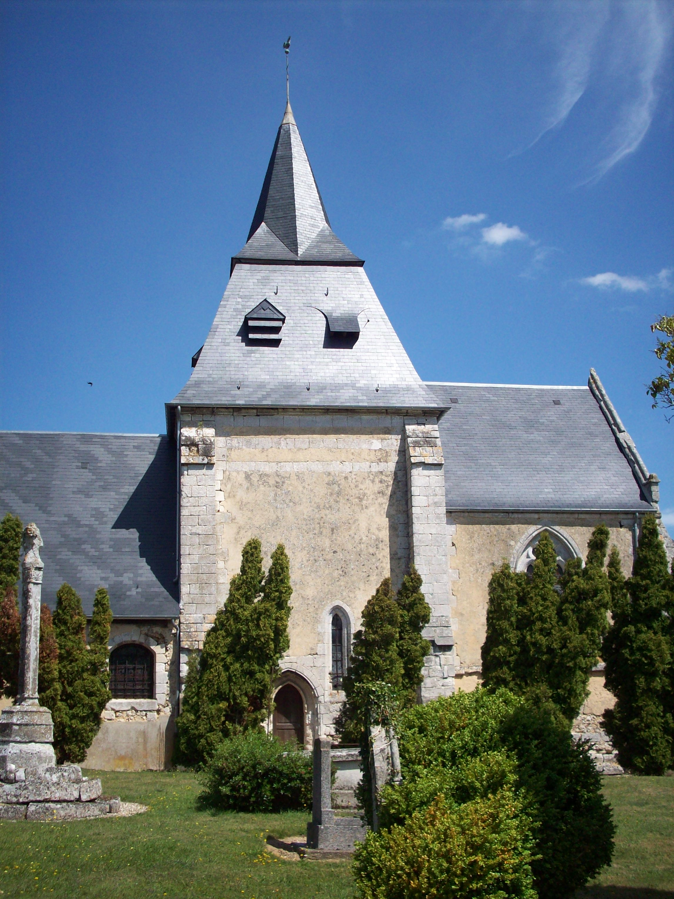 Église Saint-Ouen de Bouquelon